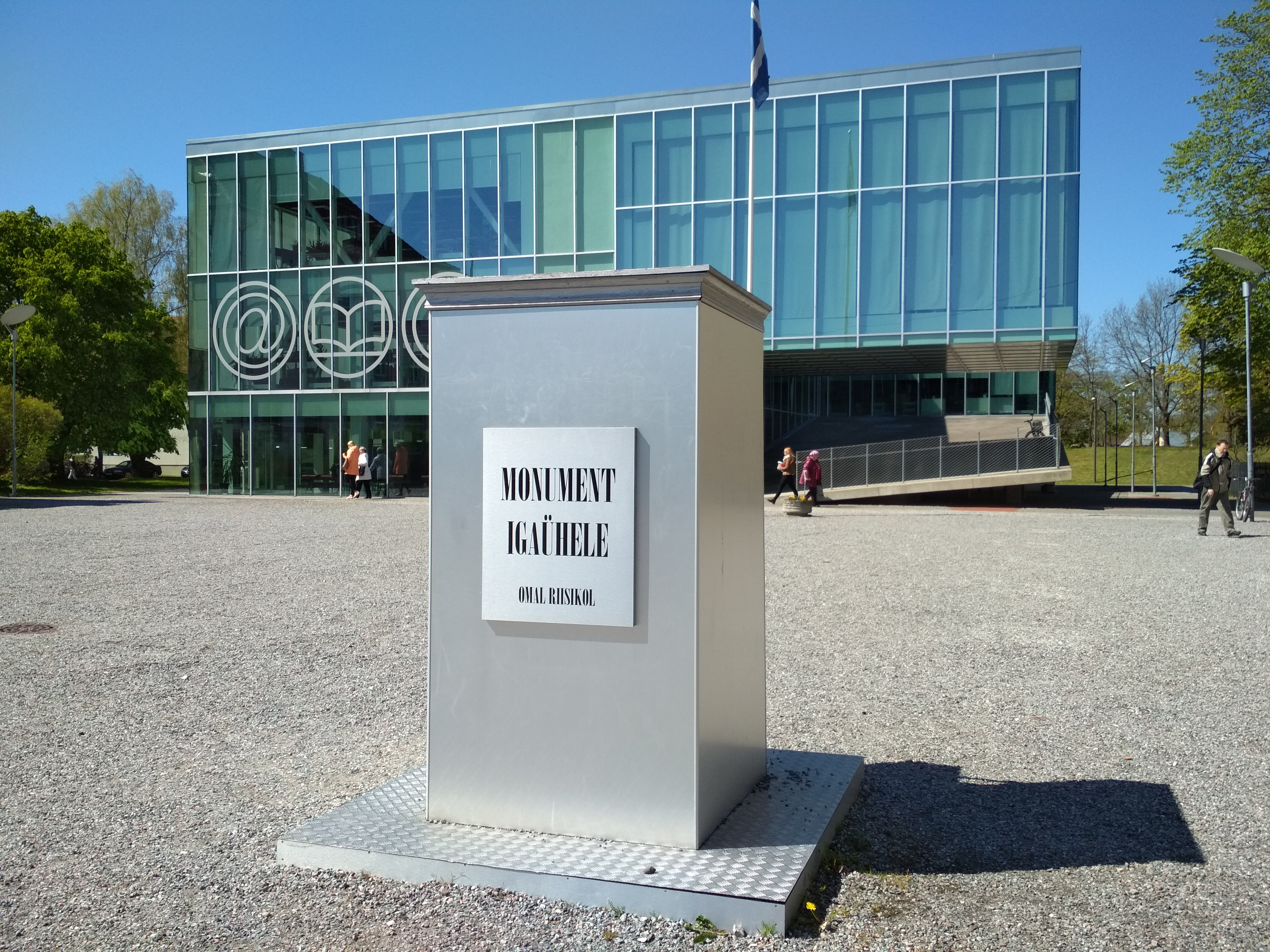 "Monument igaühele" Pärnu raamatukogu ees. Rajati Pärnu 2009. aasta skulptuuripäevade raames lätlaste poolt.